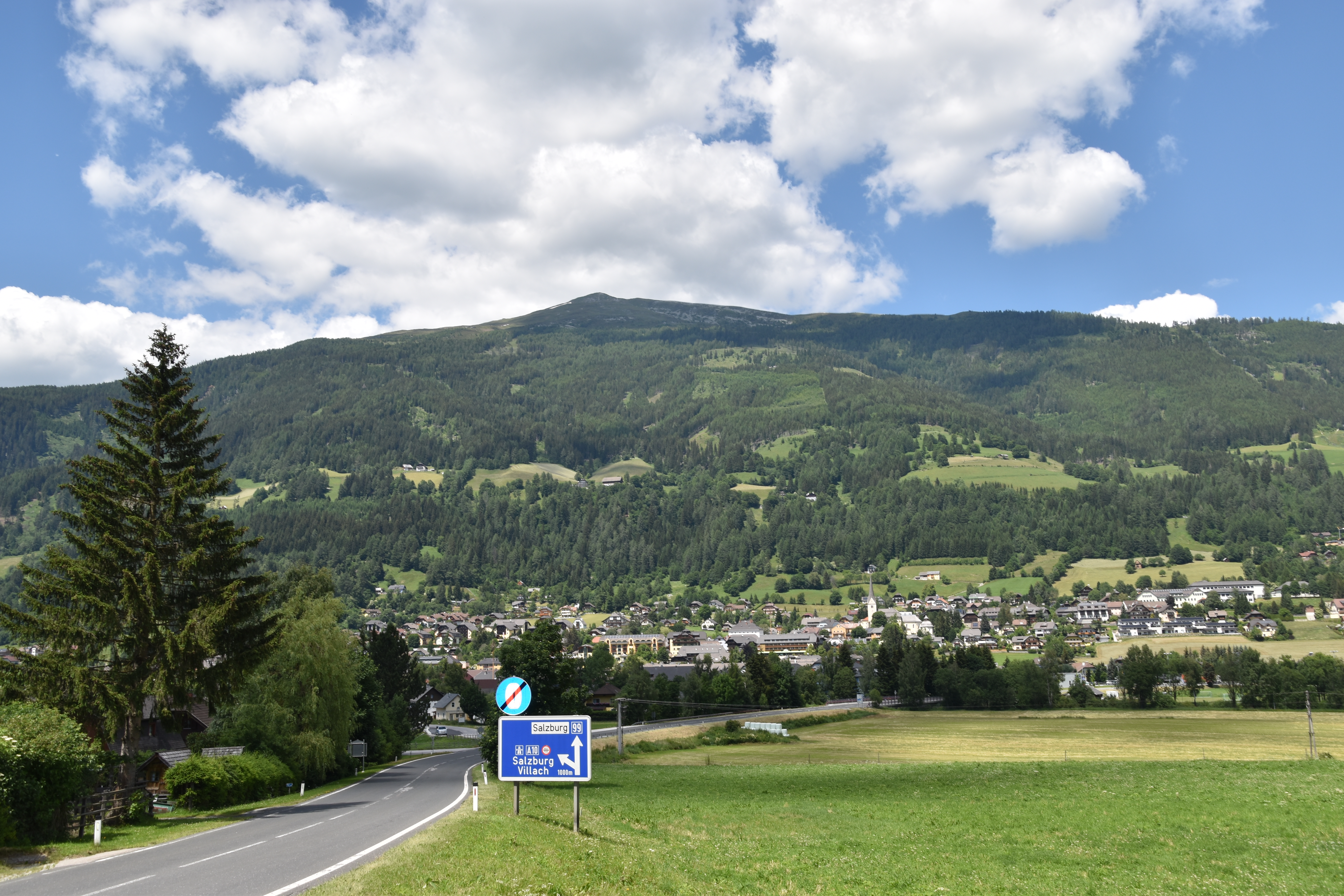 Panorama von St. Michael im Lungau (Blick von Süden, Katschbergstraße) mit dem Hausberg, dem "Speiereck" im Hintergrund